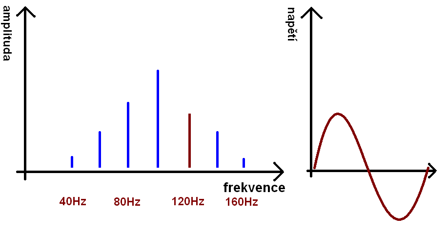 Frekvenční spektrum. Největší amplitudu má signál o frekvenci 100 Hz. Vedle je zobrazen průběh 120Hz signálu.